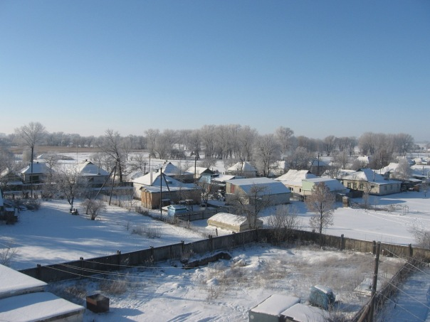 Фото зимової лосинівки. Фото не моє